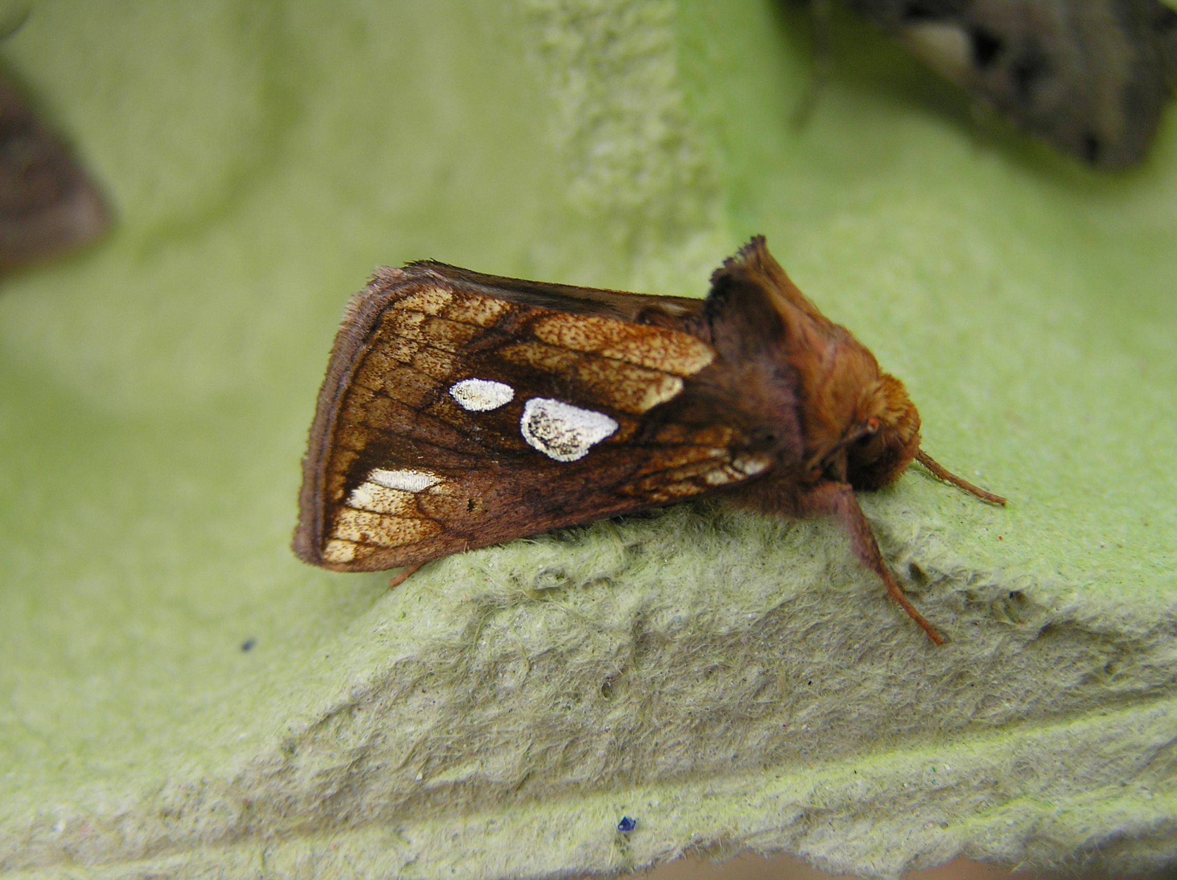 Plusia festucae